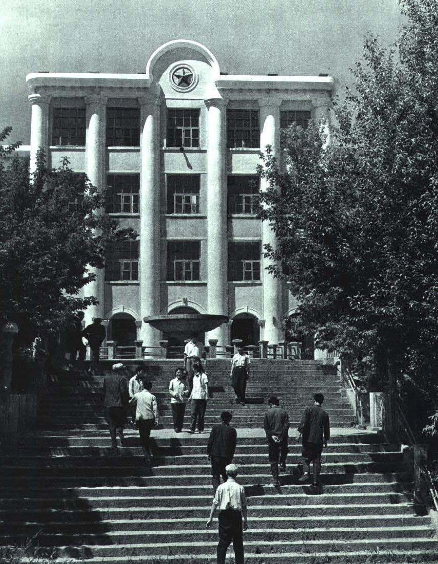 1964-11 1964年 鸡西煤矿学校